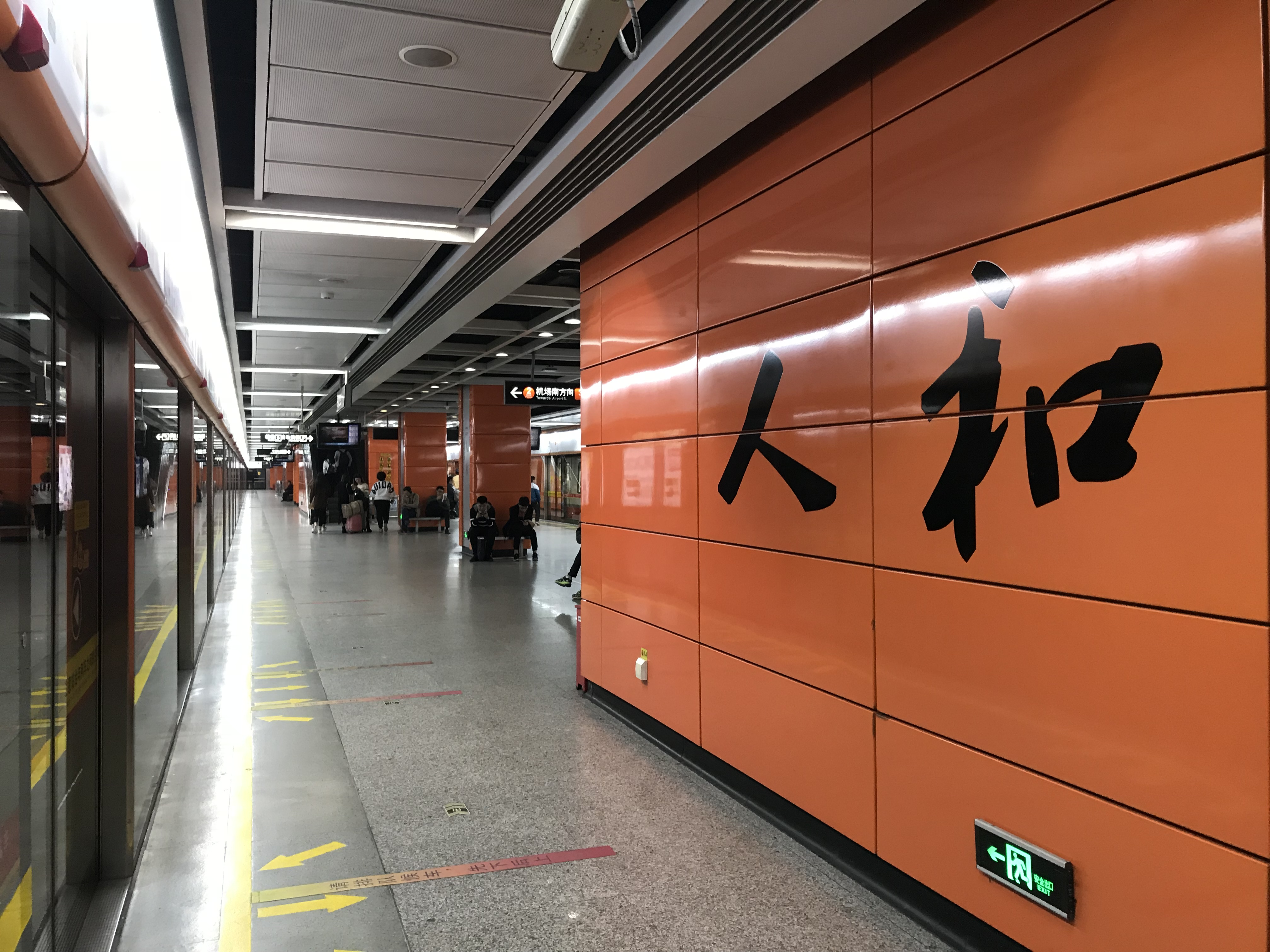 广州地铁人和站